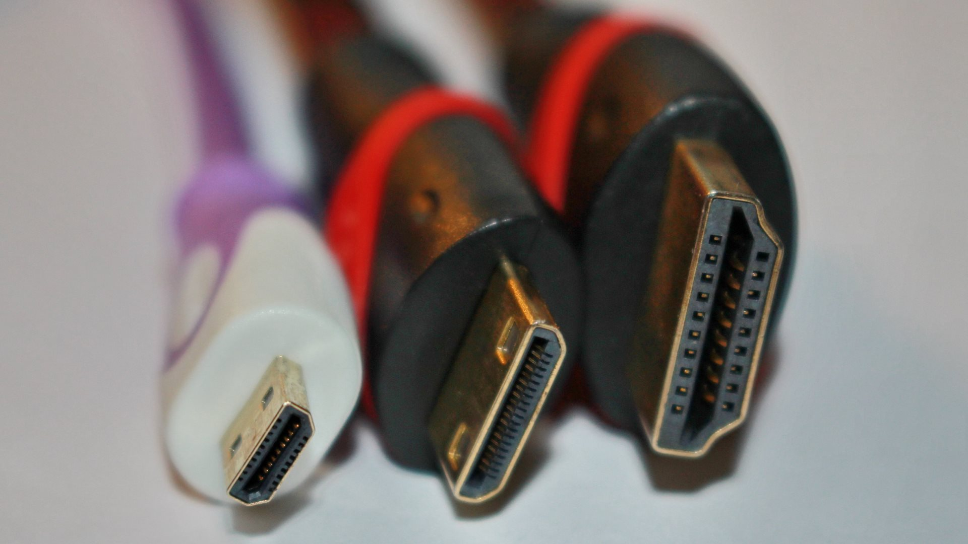 Die 3 Stecker Typen von HDMI Typ A, C & D